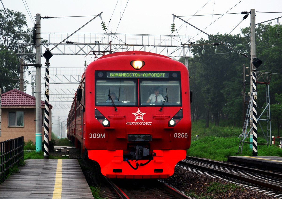 ЭД9М-0266 "Аэроэкспресс" сообщением Владивосток - Аэропорт Кневичи проезжает платформу "Чайка"